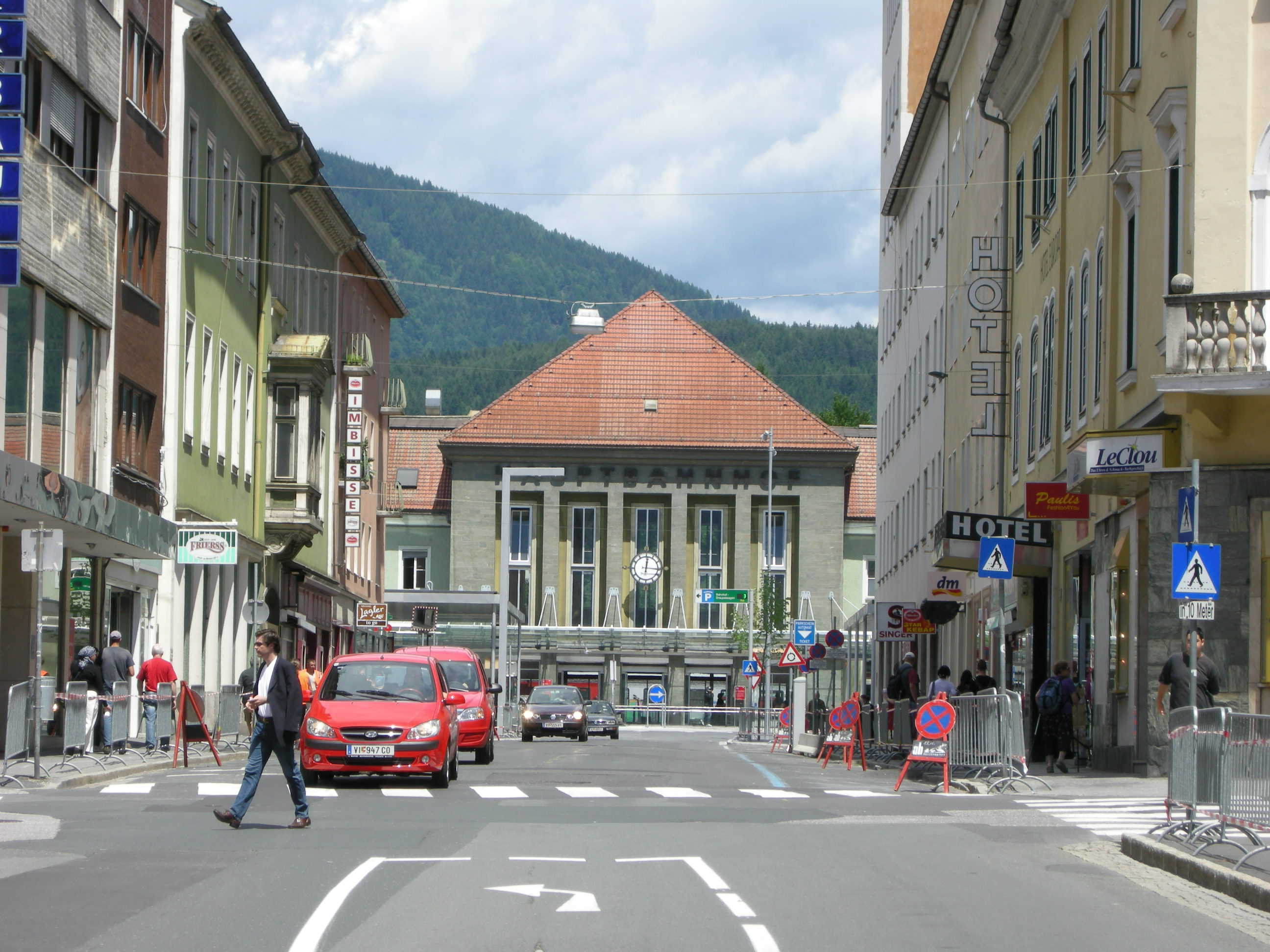 Villach, Hauptbahnhof